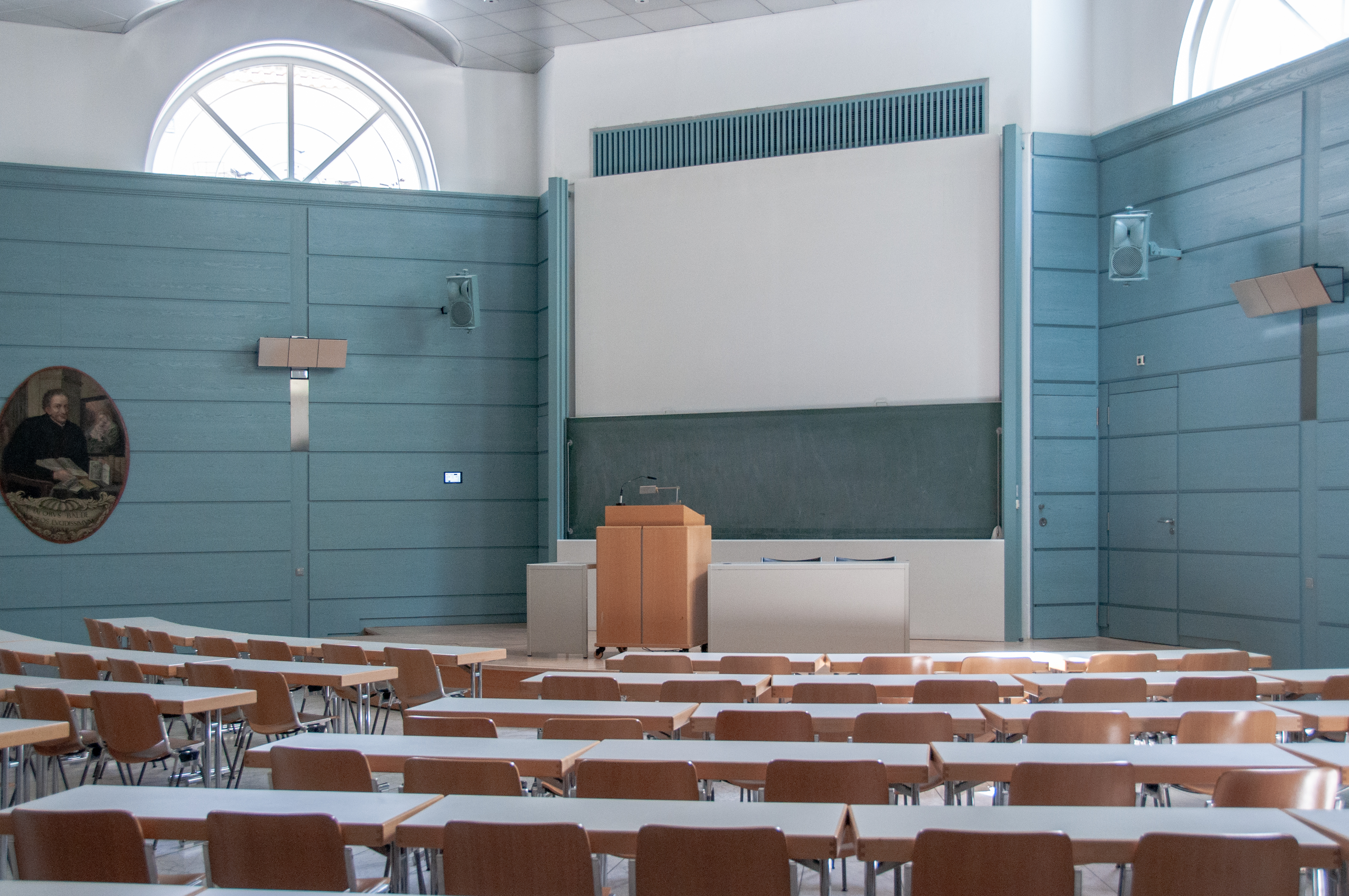 Aula der Hochschule für Philosophie München, Kaulbachstraße 31/33, München